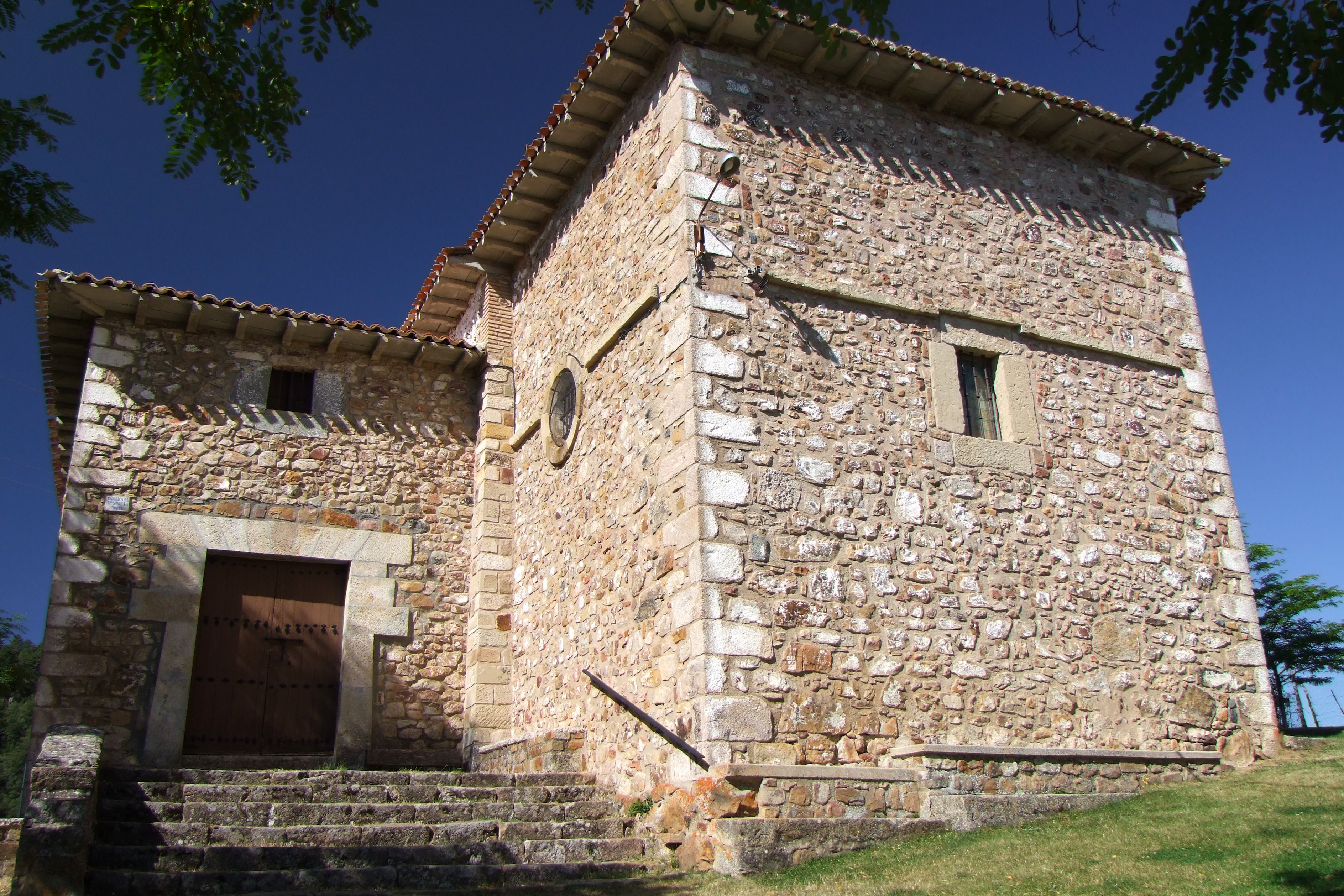 Ermita de la Torre en la localidad de Lumbreras, La Rioja - España